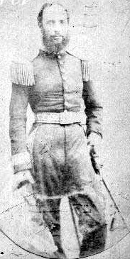 Pedro Diez Canseco, presidente interino del Perú en 1862, 1865 y 1868